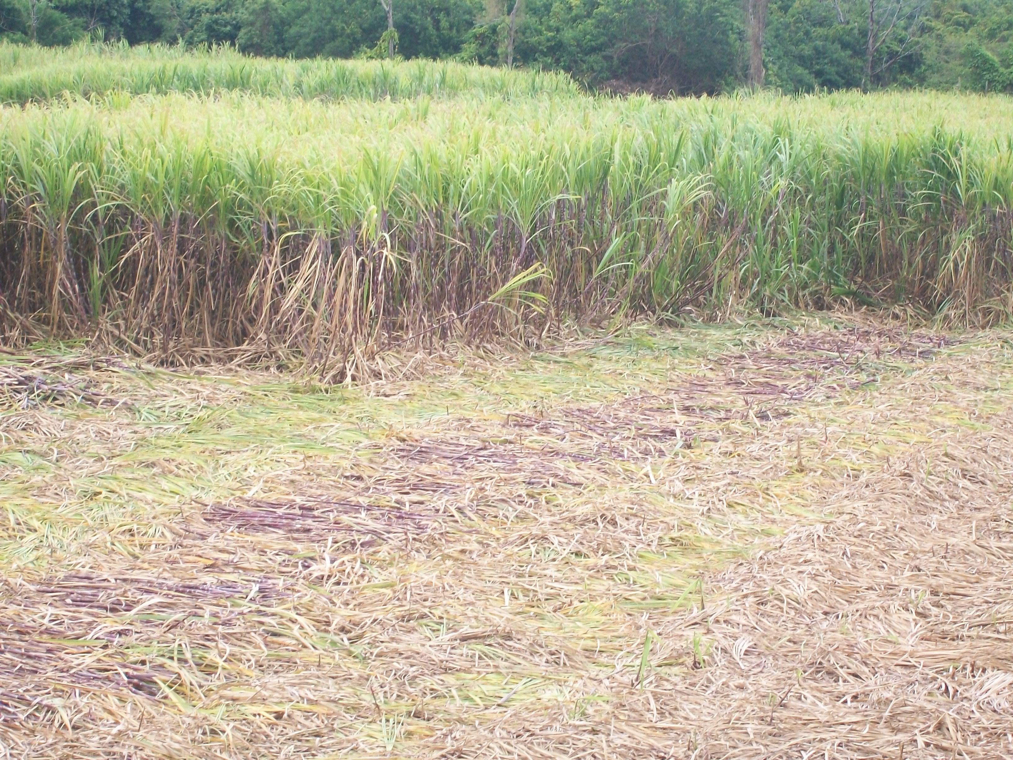 champ de canne à sucre fraîchement coupé.